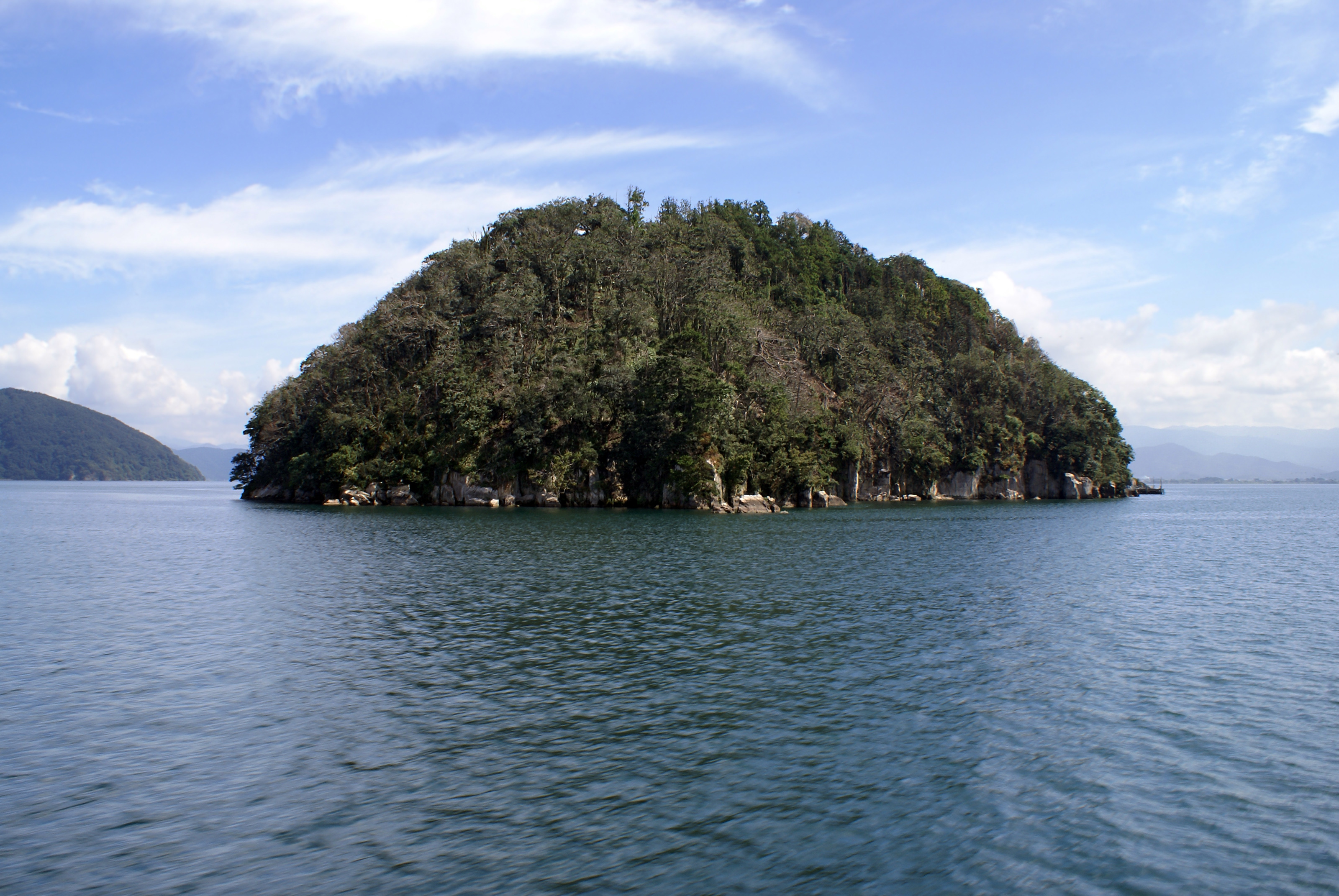 Chikubu Island (Chikubu-jima) in Nagahama, Shiga, Japan